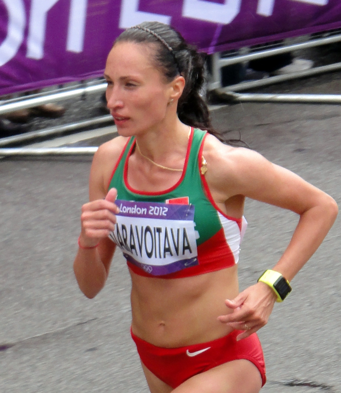 Nastassia Staravoitava & Sviatlana Kouhan (Belarus) - London 2012 Women's Marathon